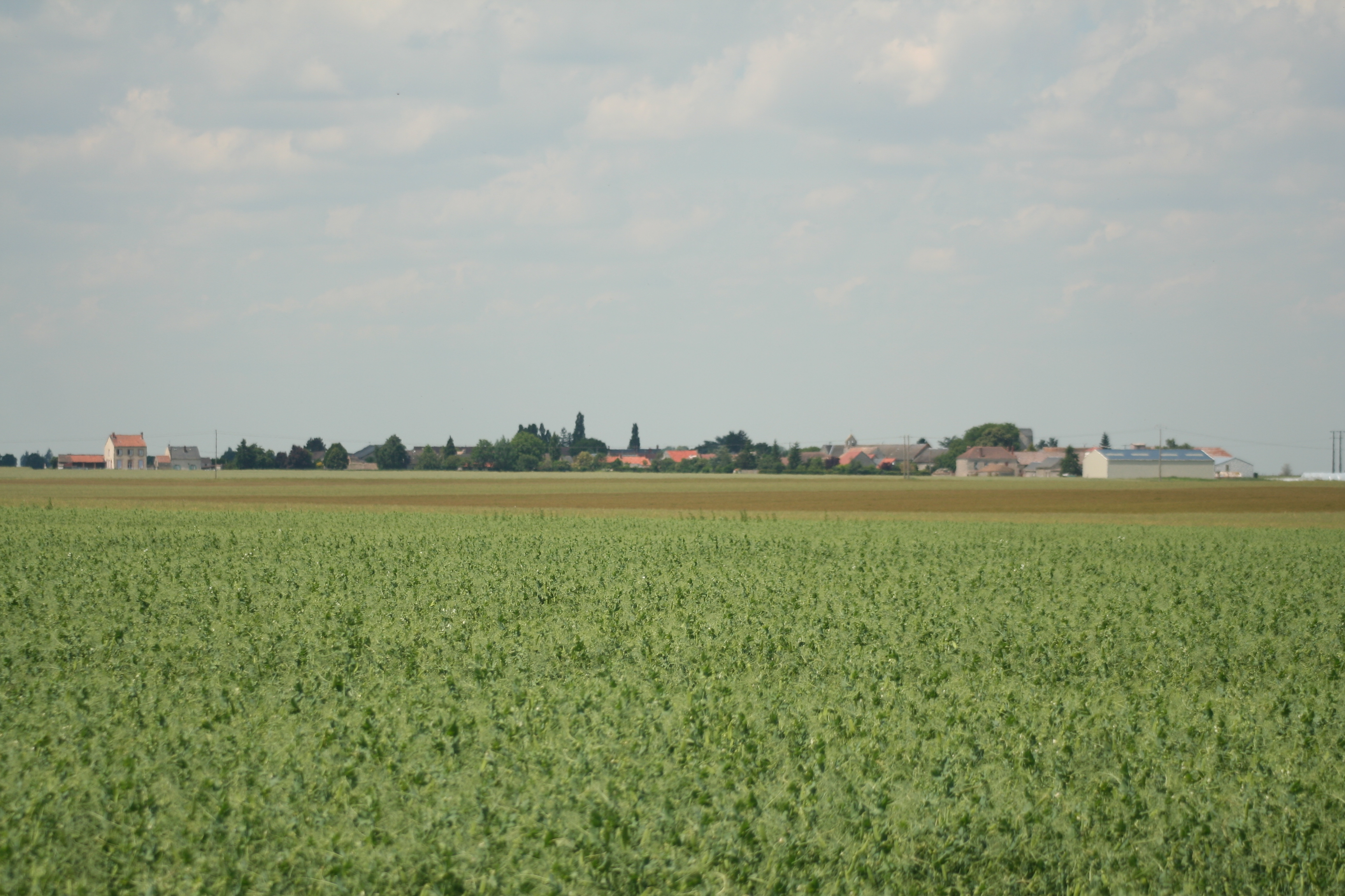 Congerville-Thionville et la plaine de beauce